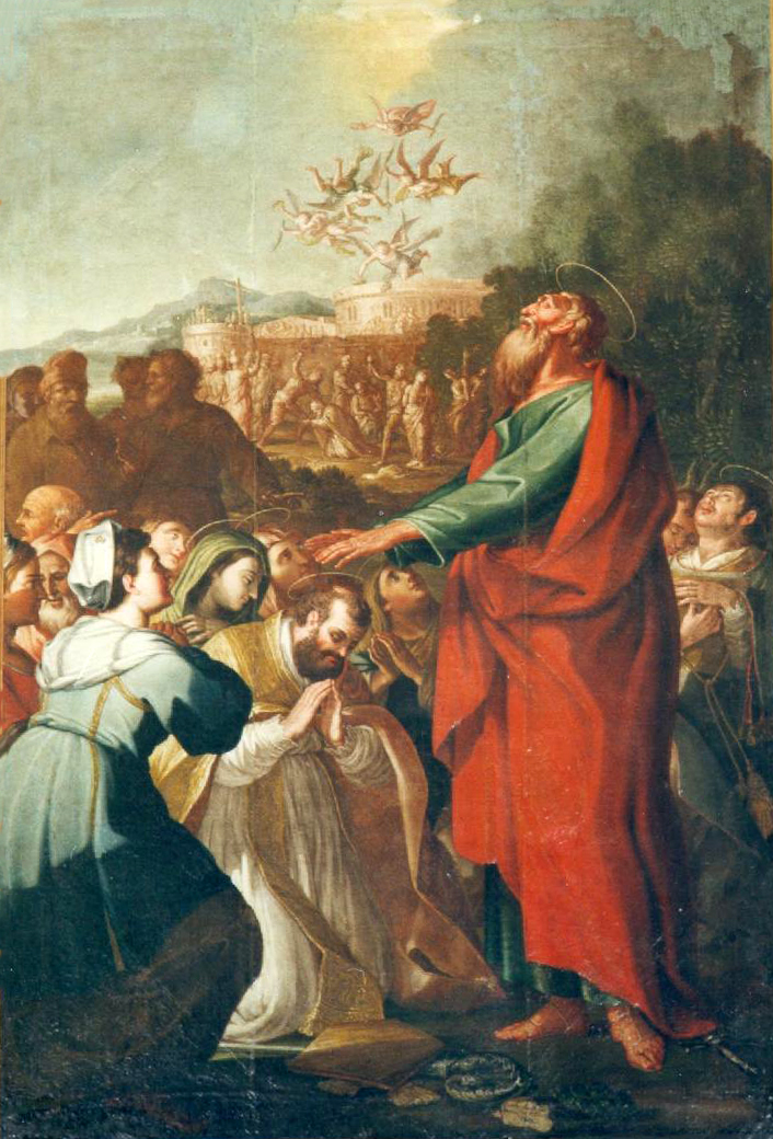 Carlo Maria Minaldi (1763-1847), Paolo di Tarso consacra Stefano da Nicea primo vescovo di Reggio (Consacrazione episcopale di Stefano da Nicea), 1823. San Paolo è in atto di consacrare Stefano da Nicea primo vescovo della diocesi di Reggio; a sinistra, sullo sfondo, è il martirio del Santo vescovo, di San Suera, a lui vicino, e delle tre sante donne Perpetua, Agnese e Felicita.